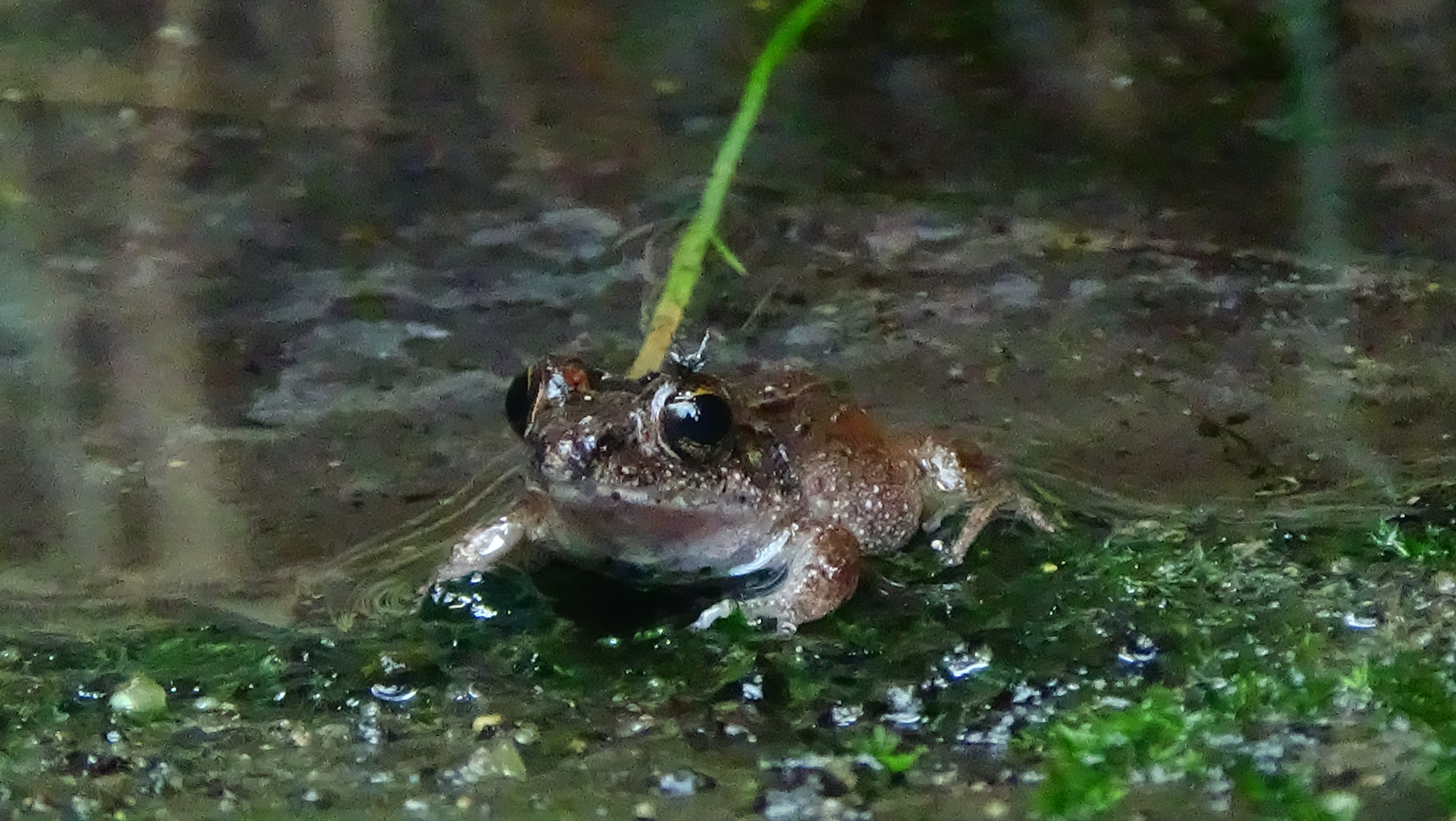 Mantidactylus betsileanus - Parc Zoologique de Paris/France - 04/2015